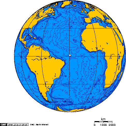 Proyección cartográfica centrada en el Archipiélago de San Pedro y San Pablo Orthographic projection centred over St Peter and Paul Rocks